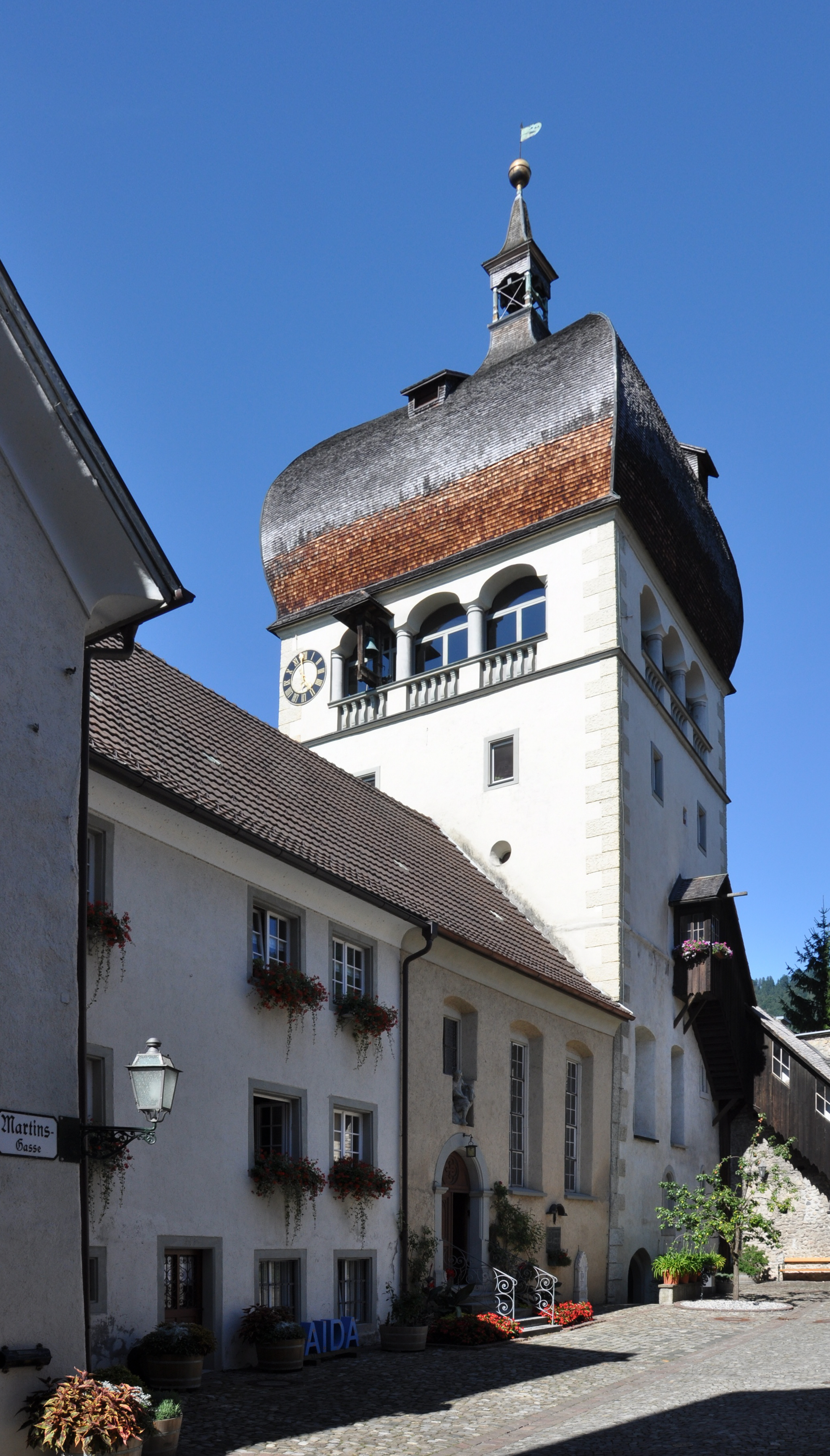 Bregenz, Martinsturm und Martinskapelle